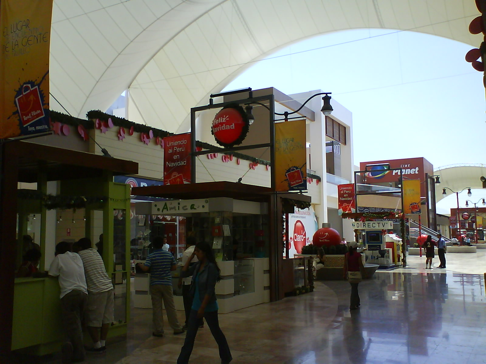 El Boulevard principal del mall. Real Plaza Trujillo.